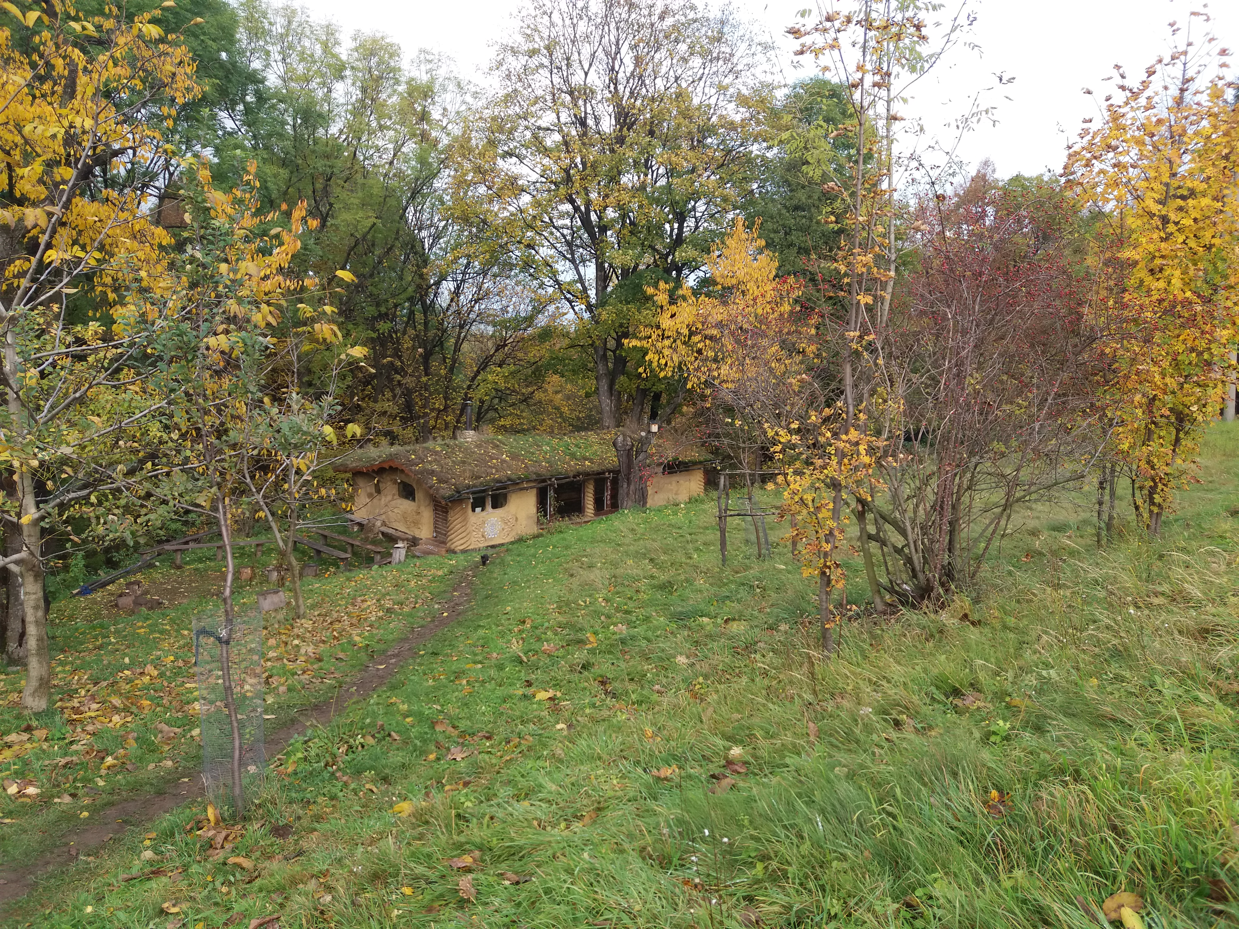 Hobitín - ekologická stavba postavená v zaniklé osadě Zastávka v Rychlebských horách